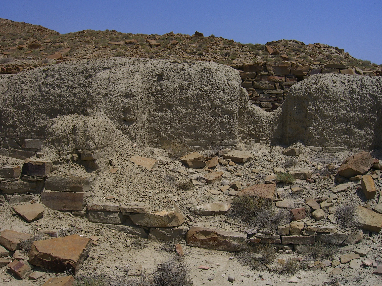 Xarabagilan - şəhər-arxeoloji abidə. antik dövr